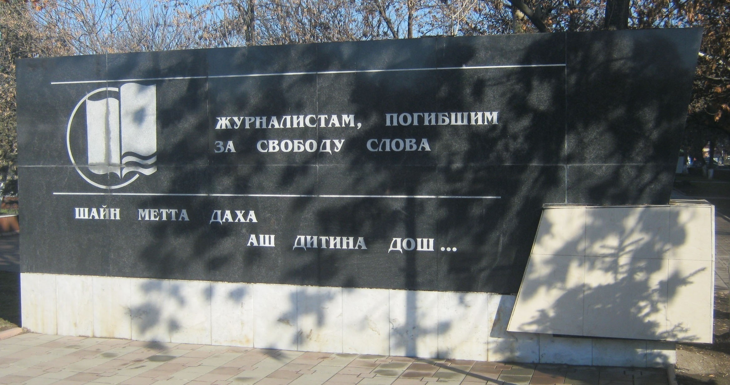 Памятник журналистам в Грозном